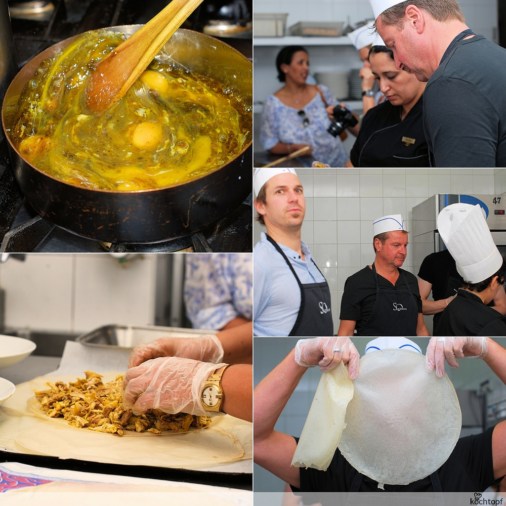 Préparation de la pastilla